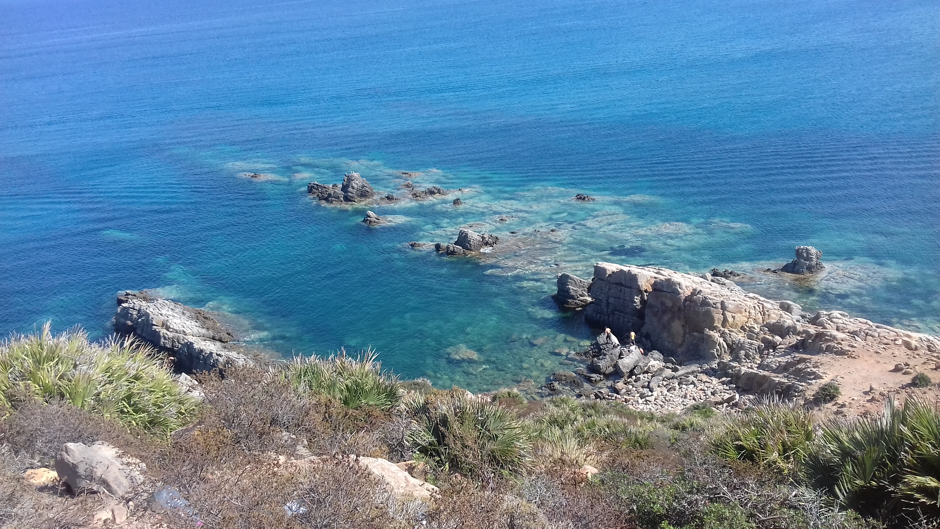 Vue de la mer de El Haouaria